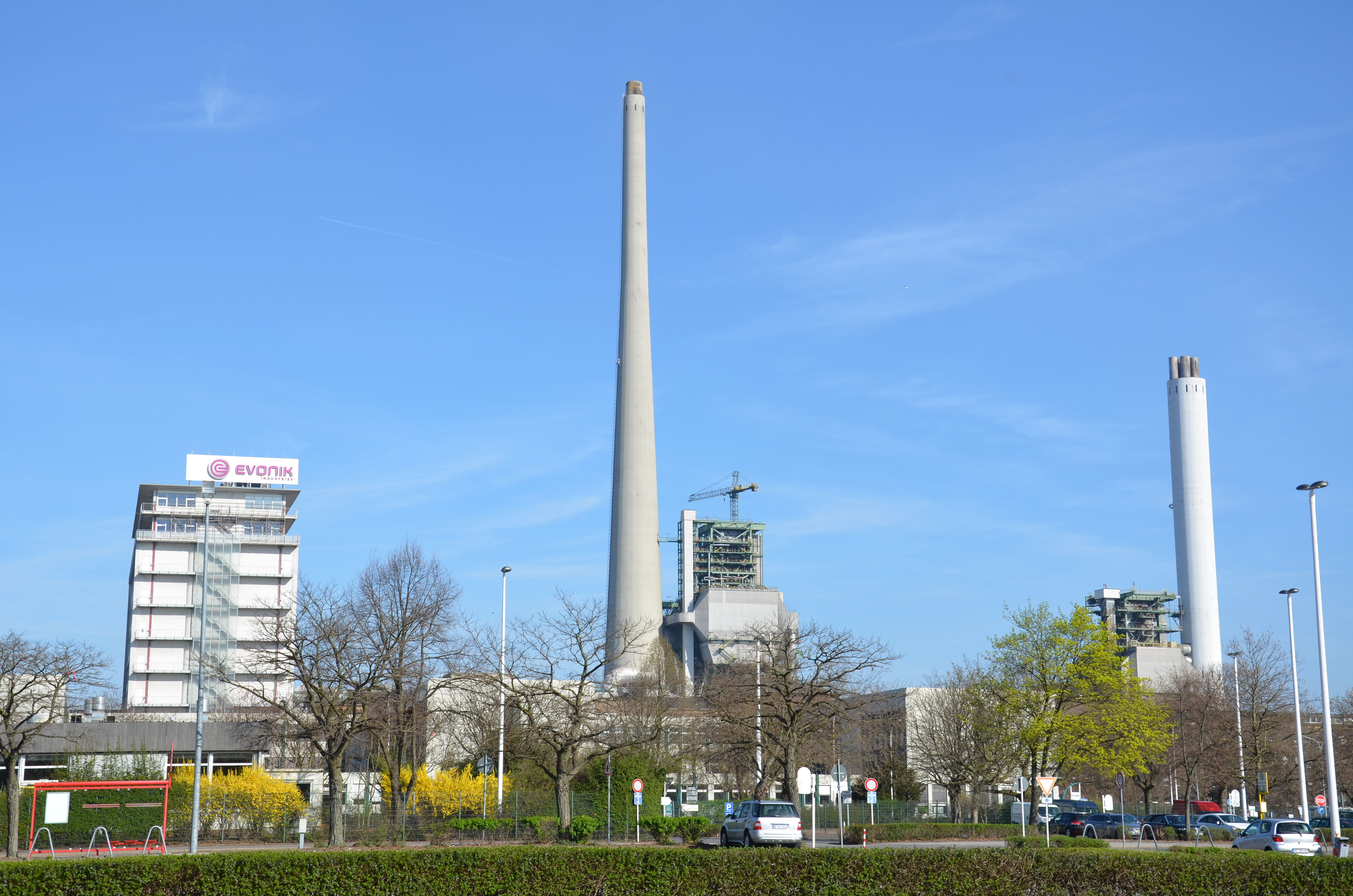 Chemiepark Marl Südseite nahe Hauptpforte, links Hochhaus, rechts neuer und alter Schornstein vom Kraftwerk 1